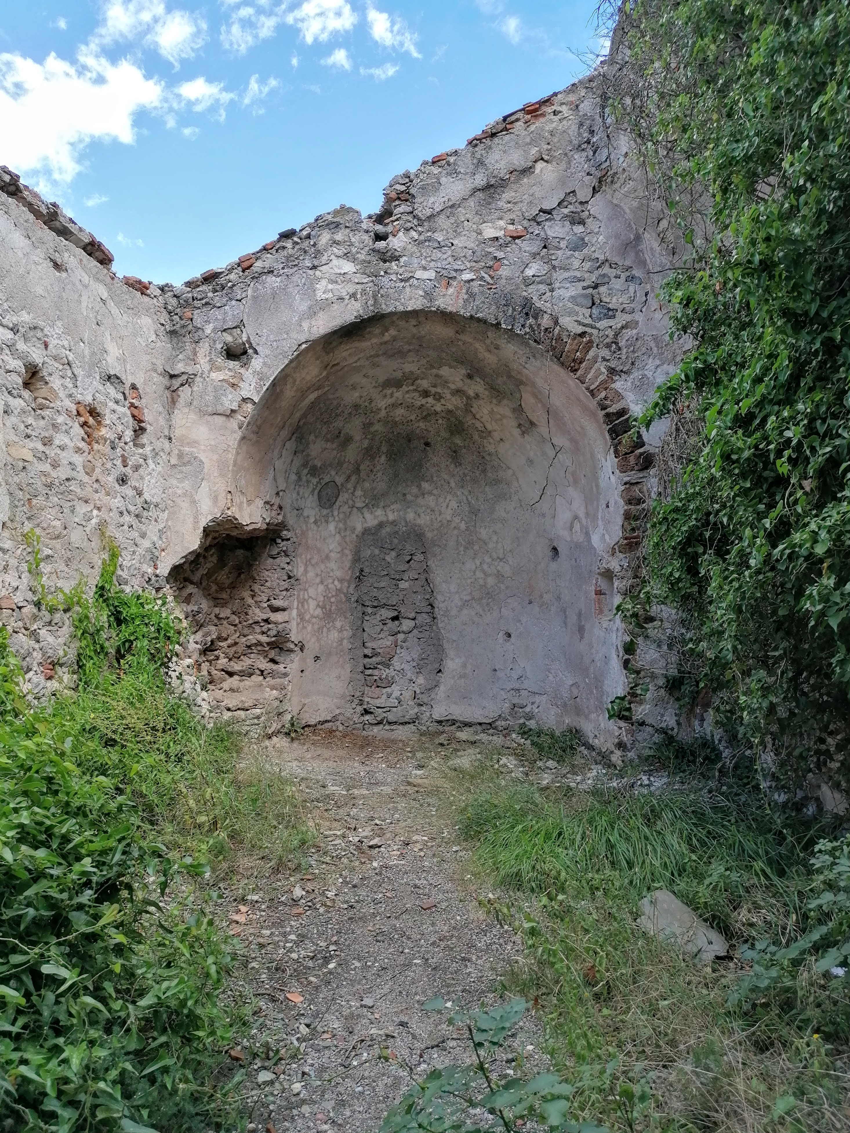 L'interno della Chiesa di Santa Margherita a Noli.